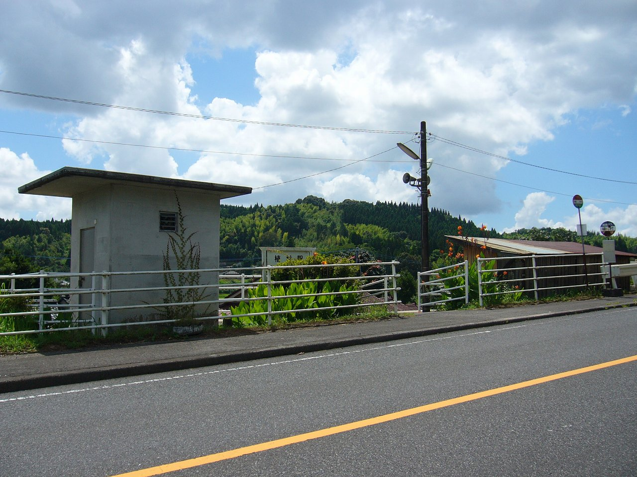 植村駅入口 2008.7.20 投稿者撮影